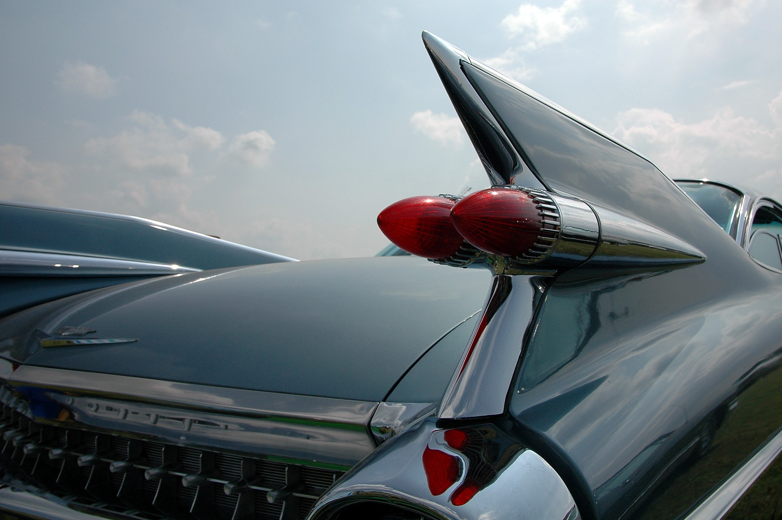 1959 Cadillac Tailfin